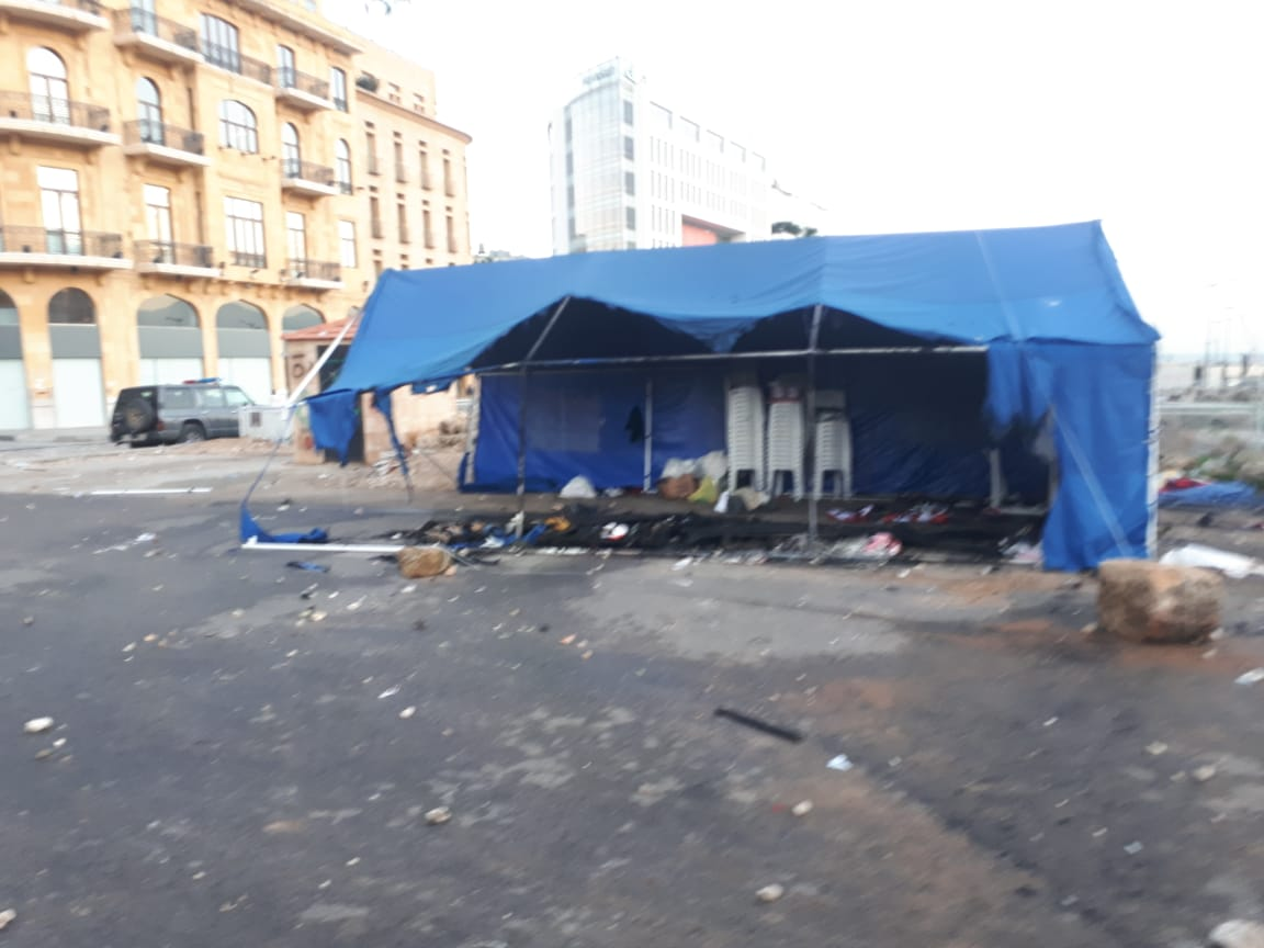 Zerstortes Zelt der Demonstranten in der Beiruter Innenstadt. Aufnahme vom 17. Dezember 2019